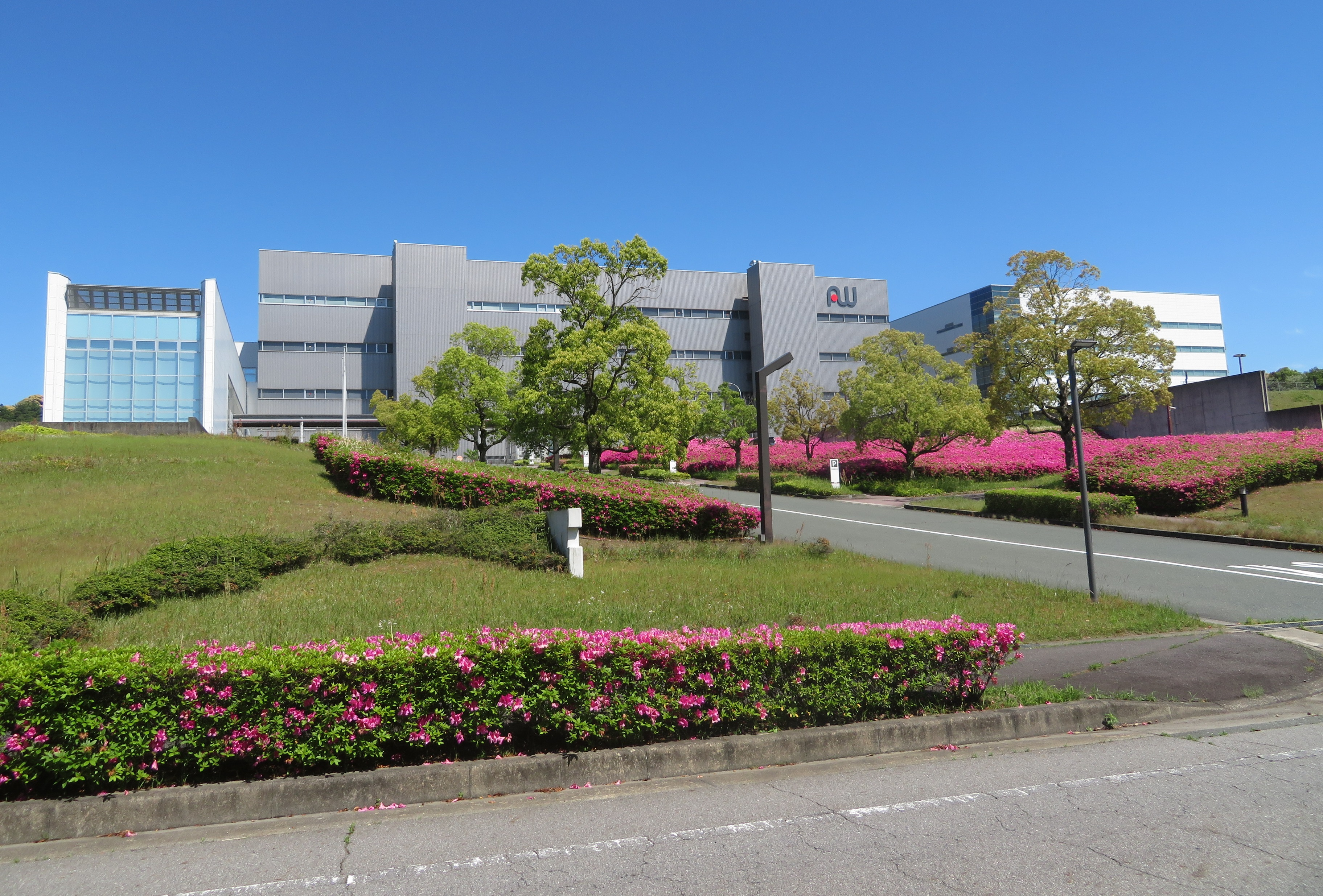 アイシン・エィ・ダブリュ岡崎工場（岡崎市岡町）